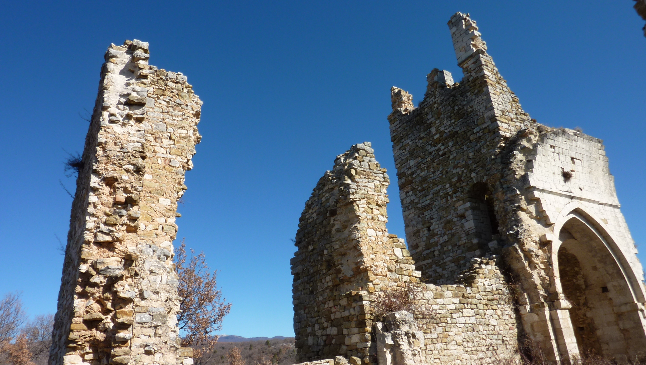 Ruines du château d'Ongles